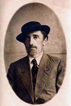 русский писатель